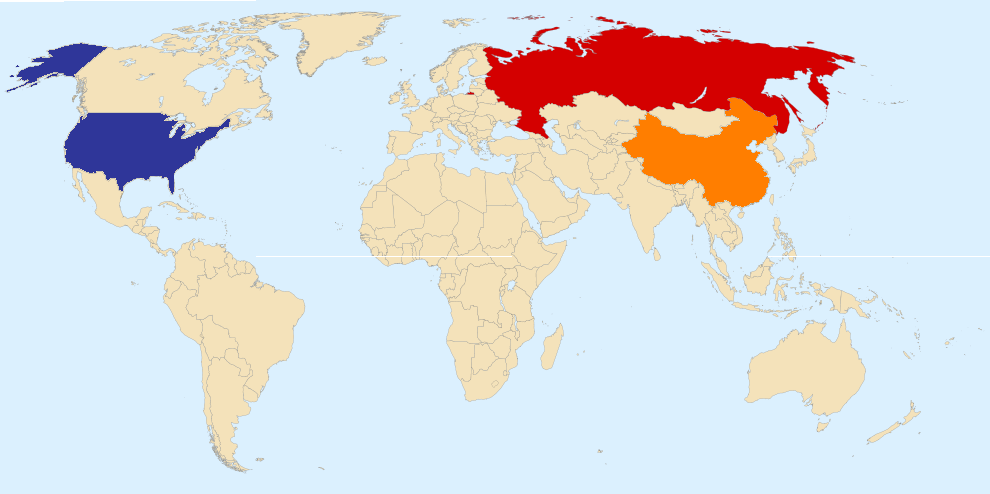 Сверхдержавы XXI века